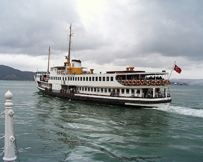 Bilder aus Istanbul